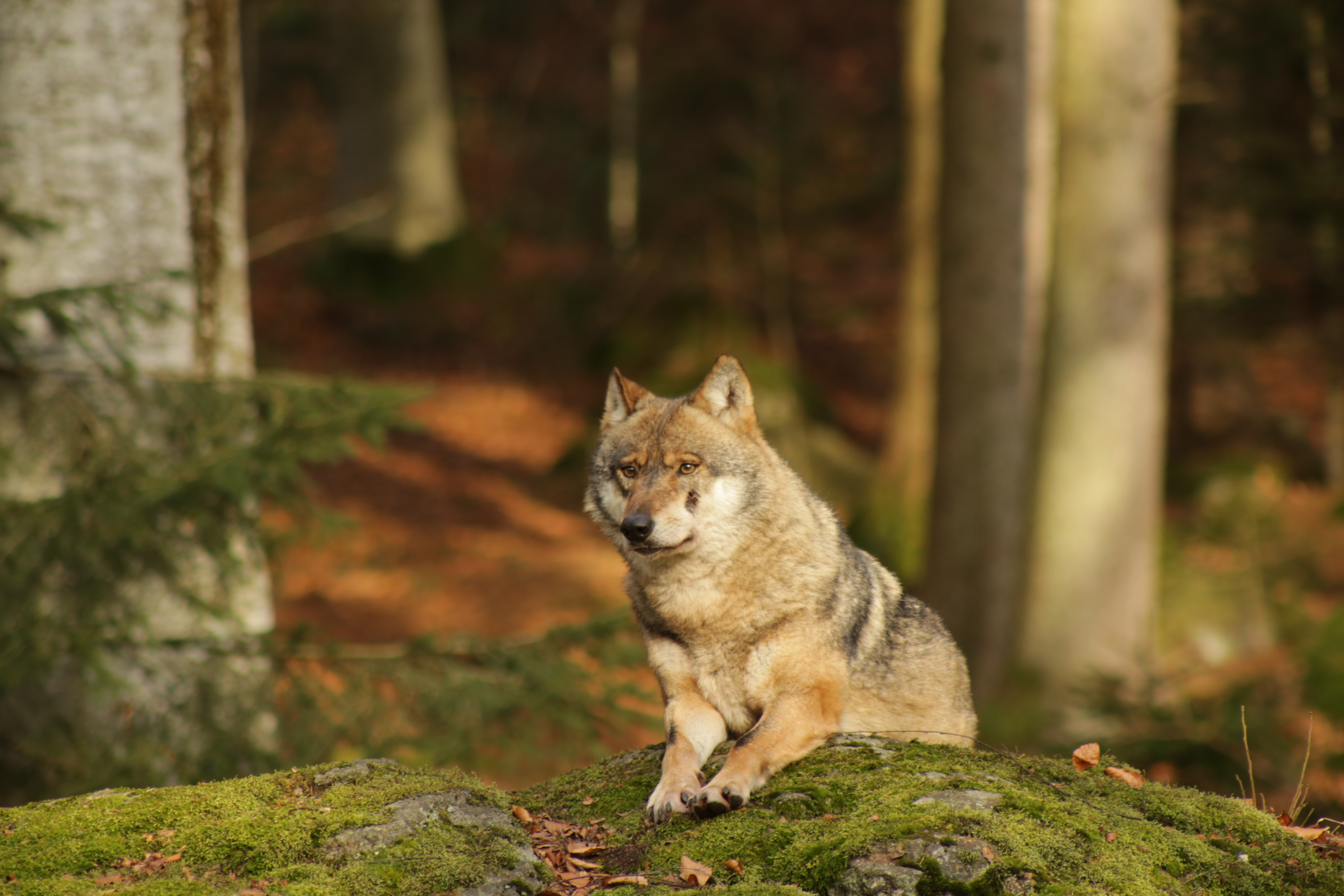 Wolf (Canis lupus) im abendlichen Sonnenlicht im Tierfreigelände des Nationalparkzentrums Lusen im Nationalpark Bayerischer Wald